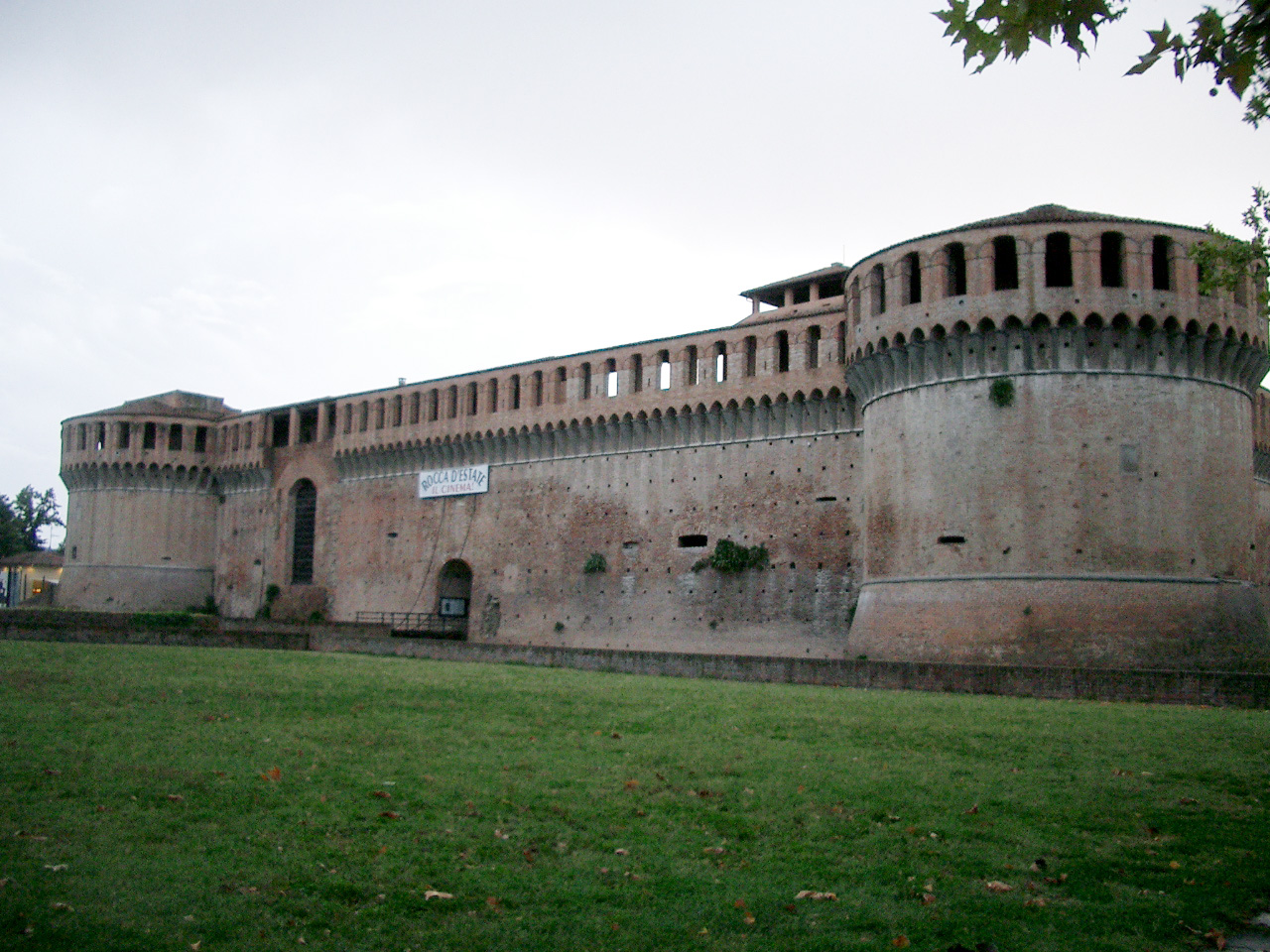 De Rocca Sforzesca in Imola. Eigen werk van Ruben Alexander